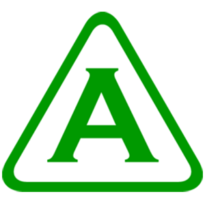 hist.Logo SV Grüna